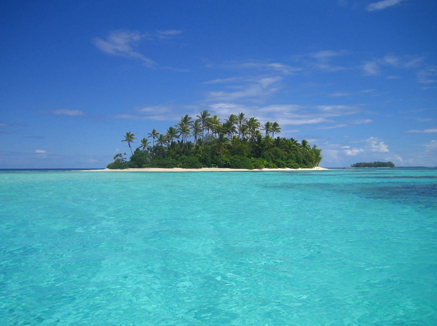 Photo de Tauna aux Îles Gambier en Polynésie française (Photo personnel 2006) Utilisateur:FRED